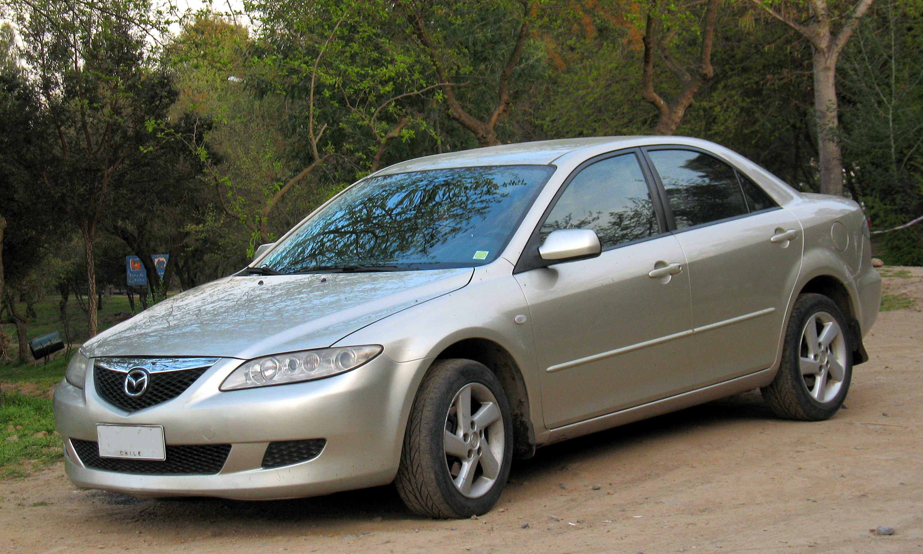 Mazda 6 2005